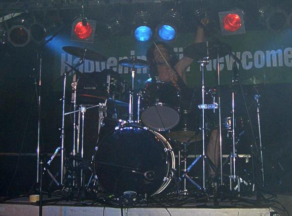 Sascha, Drumer von My Insanity